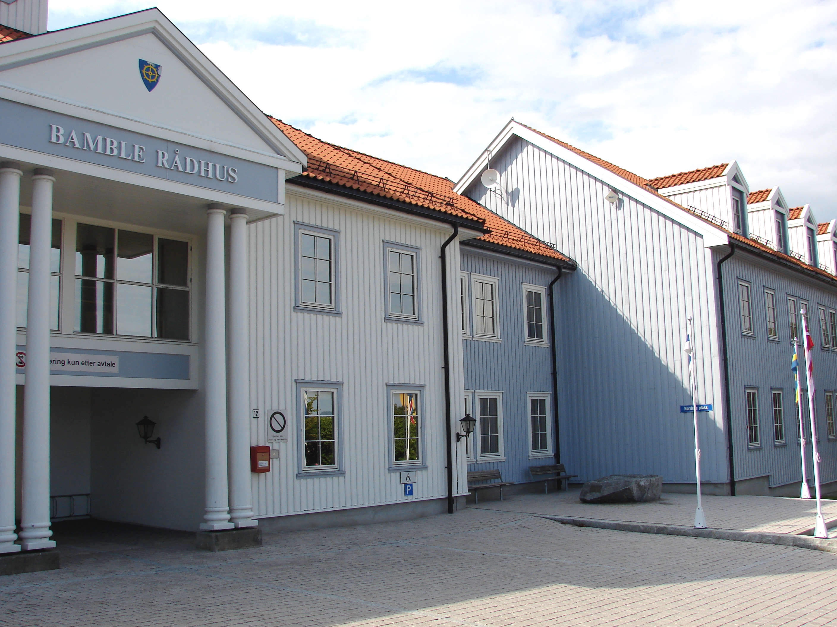 Bamble Rådhus ved Nordens Plass, Langesund, Telemark